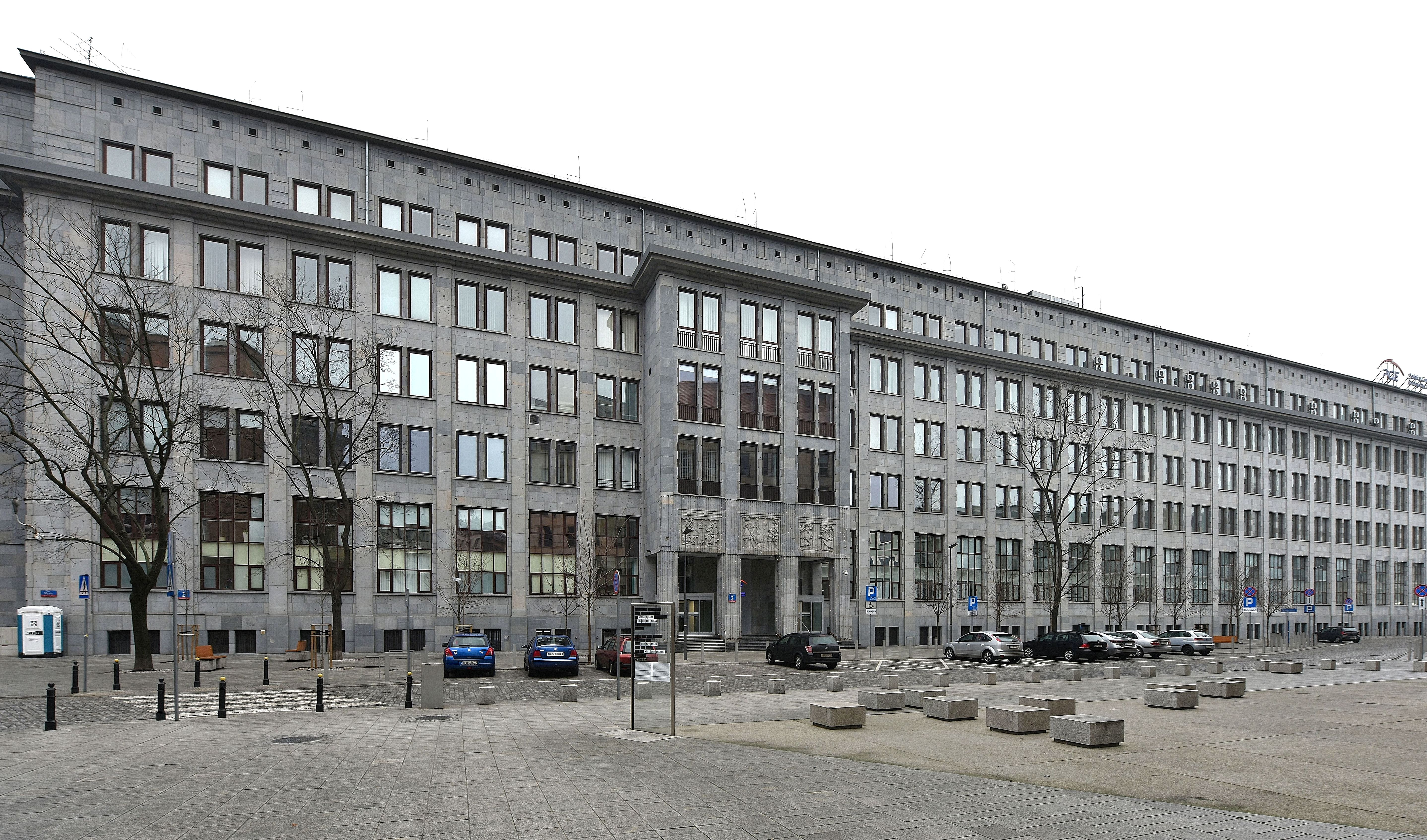 Siedziba PGE Polskiej Grupy Energetycznej przy ul. Mysiej 2 w Warszawie